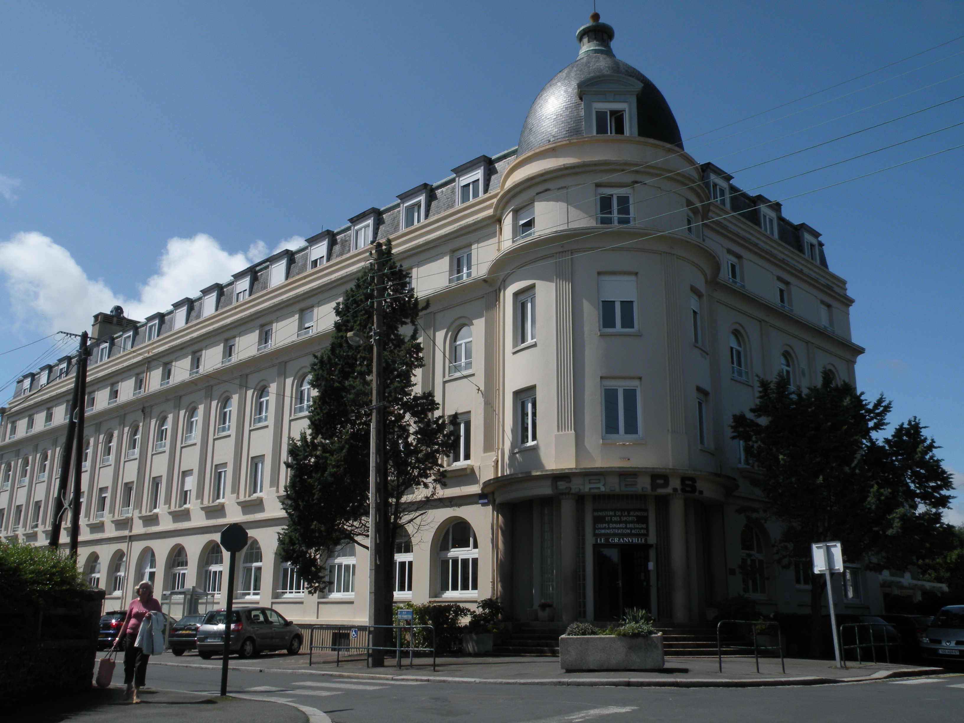 Le Centre régional d'éducation populaire et de sport de Bretagne à Dinard.